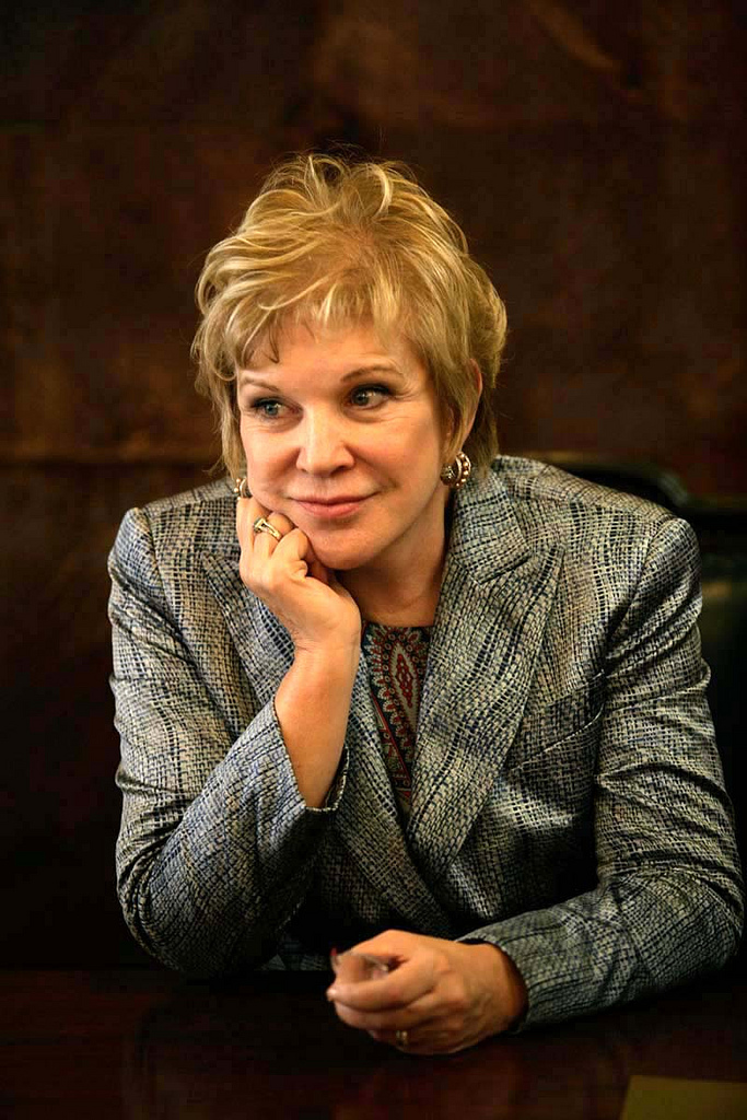 "Na tarde desta quinta-feira, 27, a ministra da Cultura, Marta Suplicy, fez uma visita à Fundação Biblioteca Nacional (FBN) e junto com o presidente da instituição, Galeno Amorim, anunciou R$ 70 milhões para a primeira etapa da recuperação do prédio-sede, no Rio de Janeiro."